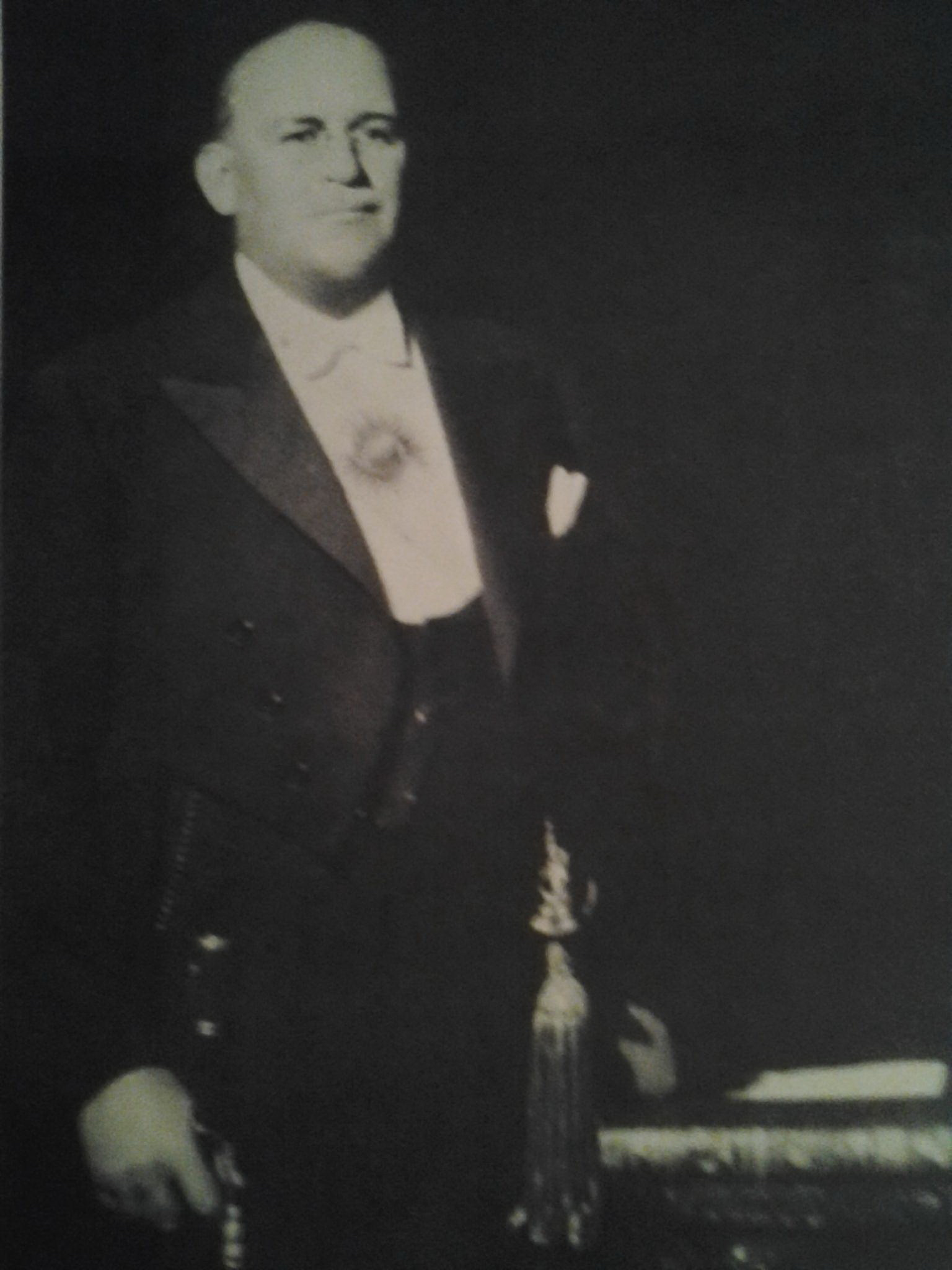 Foografía de Agustín Pedro Justo.